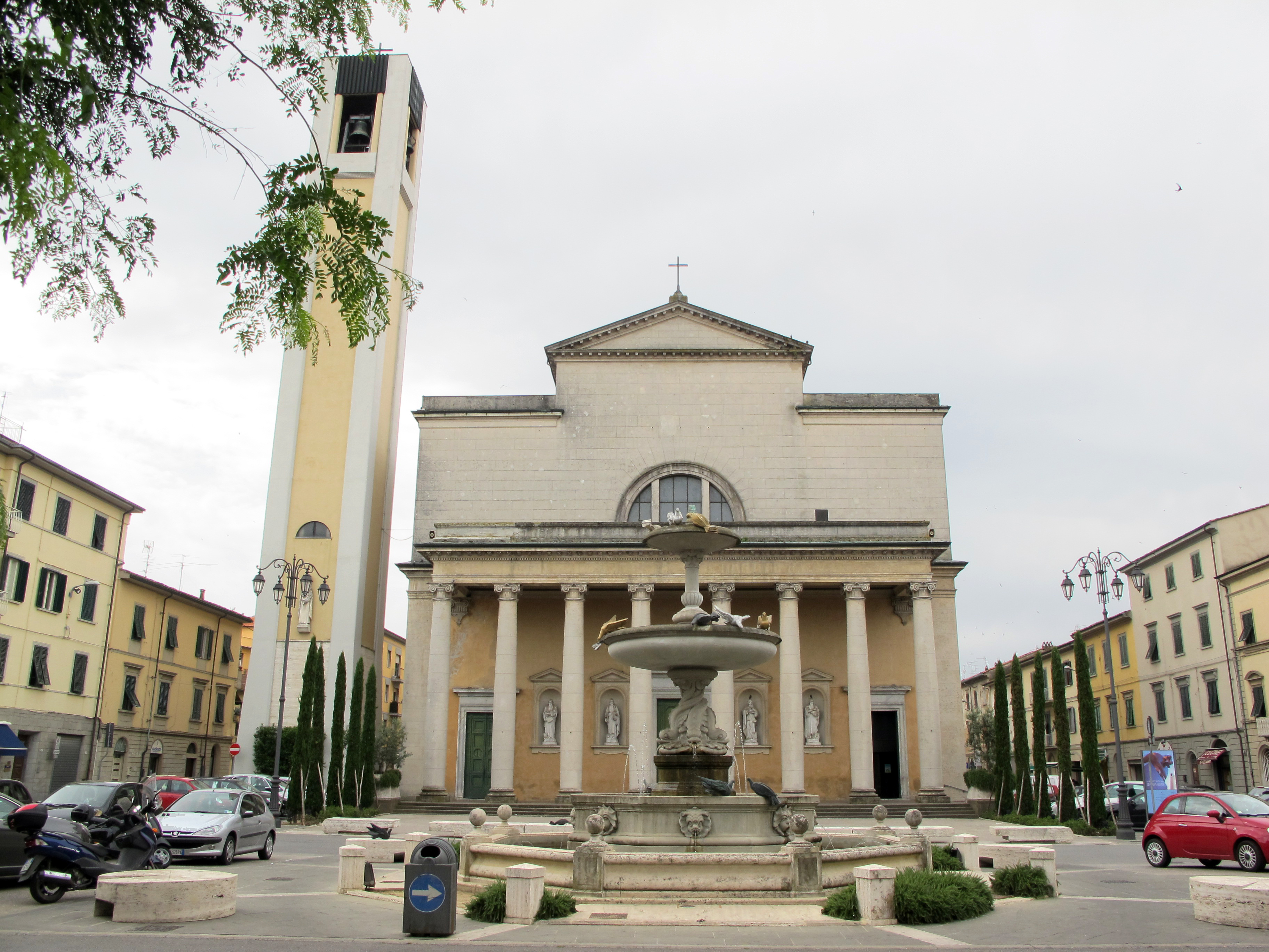 Santi Jacopo e Filippo (Pontedera)